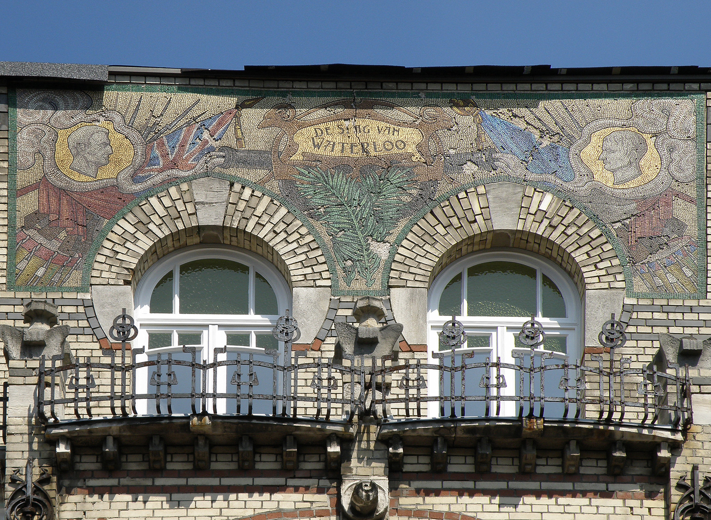 Anvers, Belgique. Maison de style Art nouveau, dénommée De Slag van Waterloo (« la Bataille de Waterloo »), sise au n°11 Waterloostraat, dans le quartier Zurenborg. Gros plan de la mosaïque. Architecte: Frans Smet-Verhas, 1905.